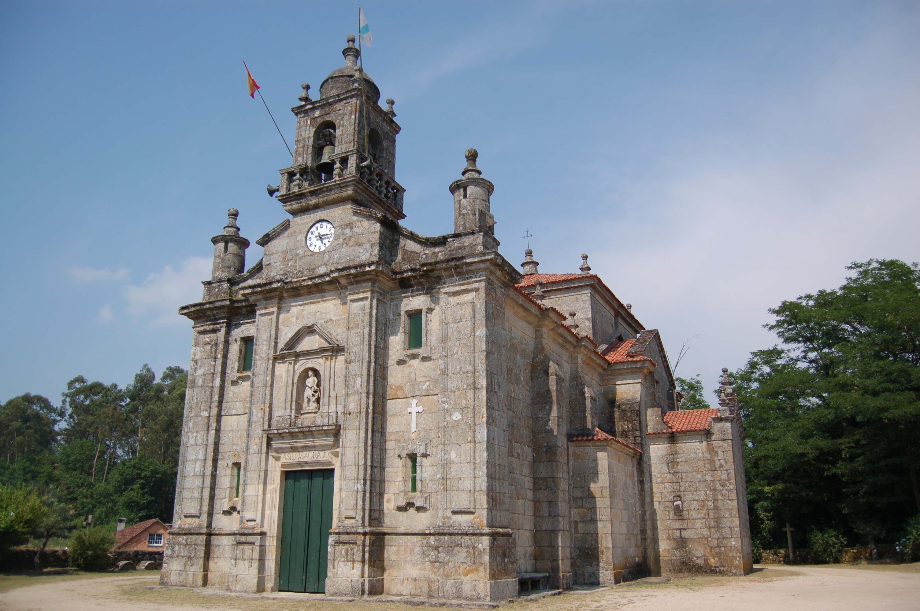 Igrexa parroquial de Fornelos (Salvaterra de Miño)